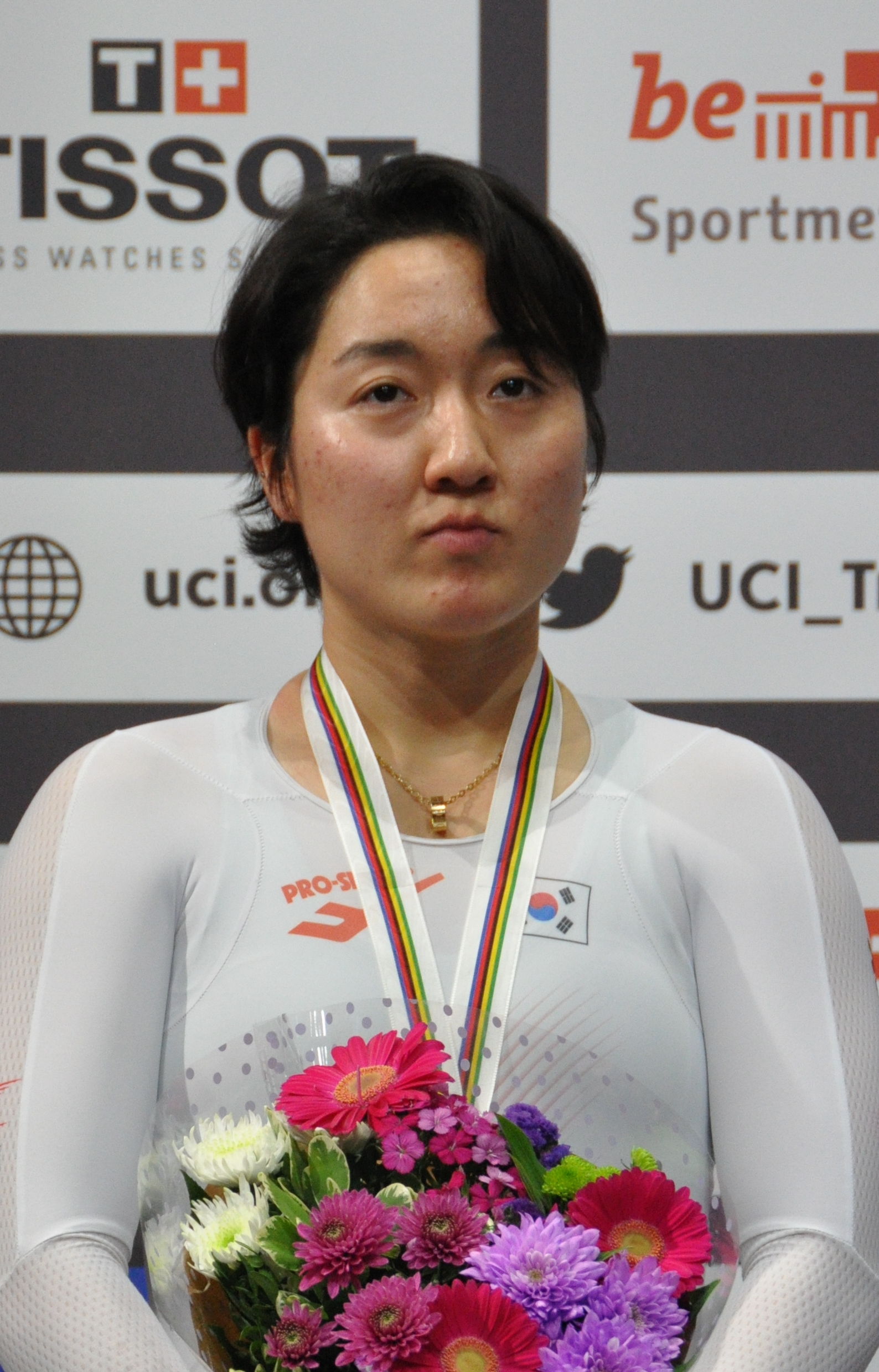 Lee Hye-jin, Radsportlerin aus Korea, Silber im Keirin